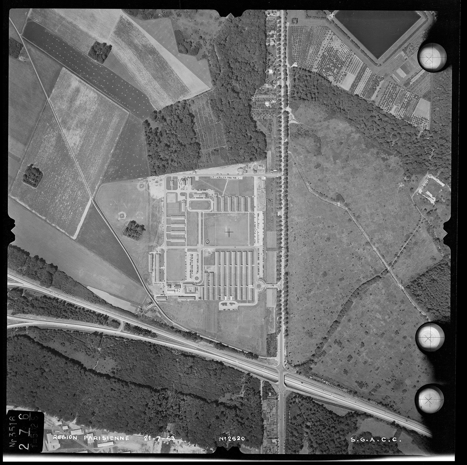 Site du SHAPE (Supreme Headquarters Allied Powers Europe). Vue Aérienne du 09-08-1953